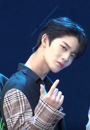 24일 오후 서울 송파구 방이동 올림픽공원 SK핸드볼경기장에서 CIX의 데뷔 쇼케이스 '안녕, 낯선 사람(Hello, Stranger)’가 진행되었다.